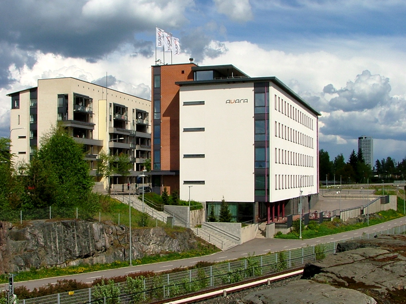 Avaran pääkonttori Helsingin Vuosaaressa, Rastilankallion alueella. Rakennus sijaitsee osoitteessa Retkeilijänkatu 11 ja se valmistui vuonna 2003 [1]. Taustalla näkyy Vuosaaren tornitalo.